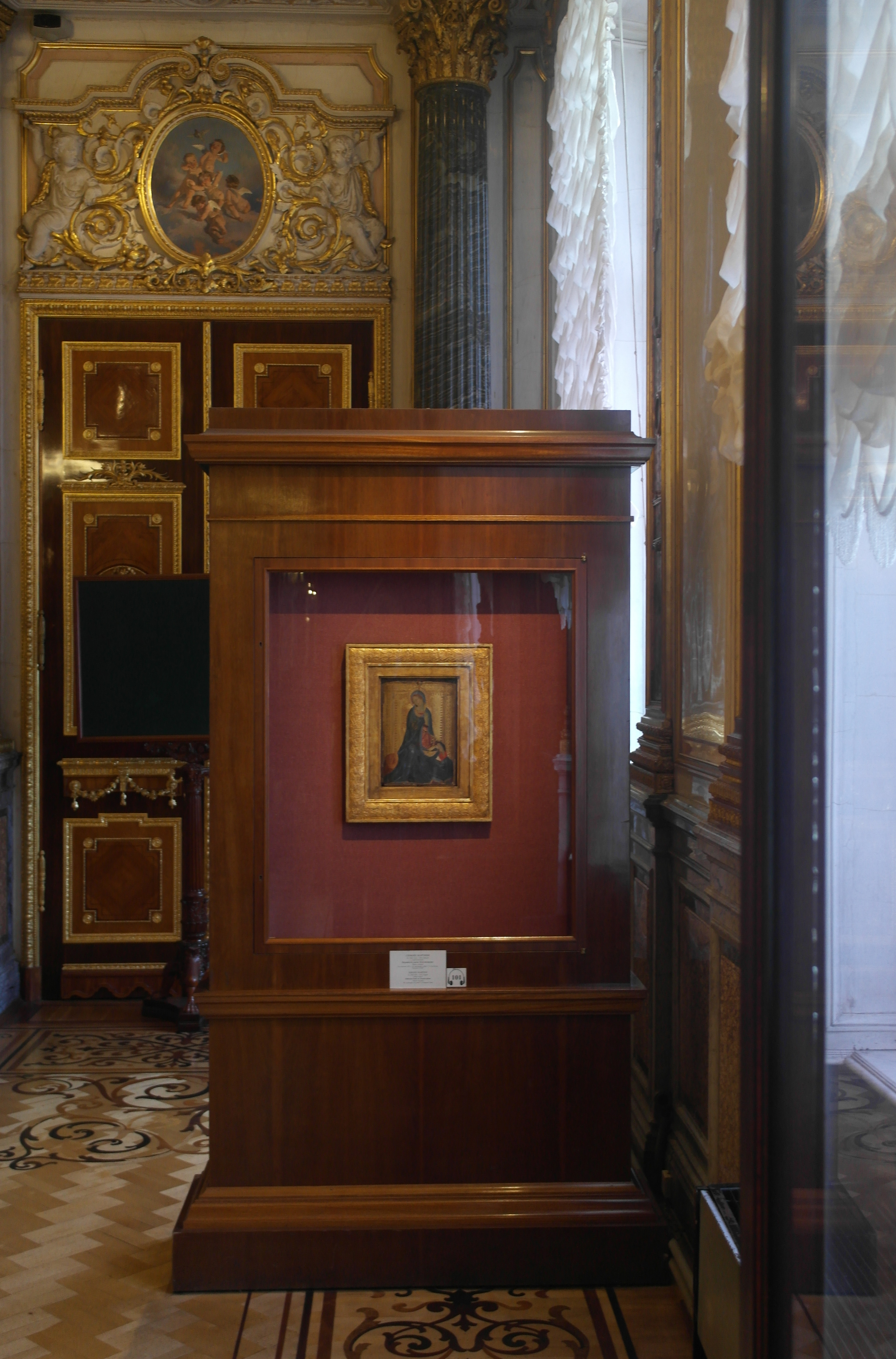 Картина Симоне Мартини "Мадонна из сцены «Благовещение»"